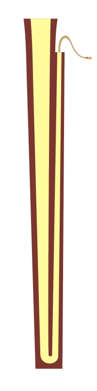 Schématický řez dulcianem